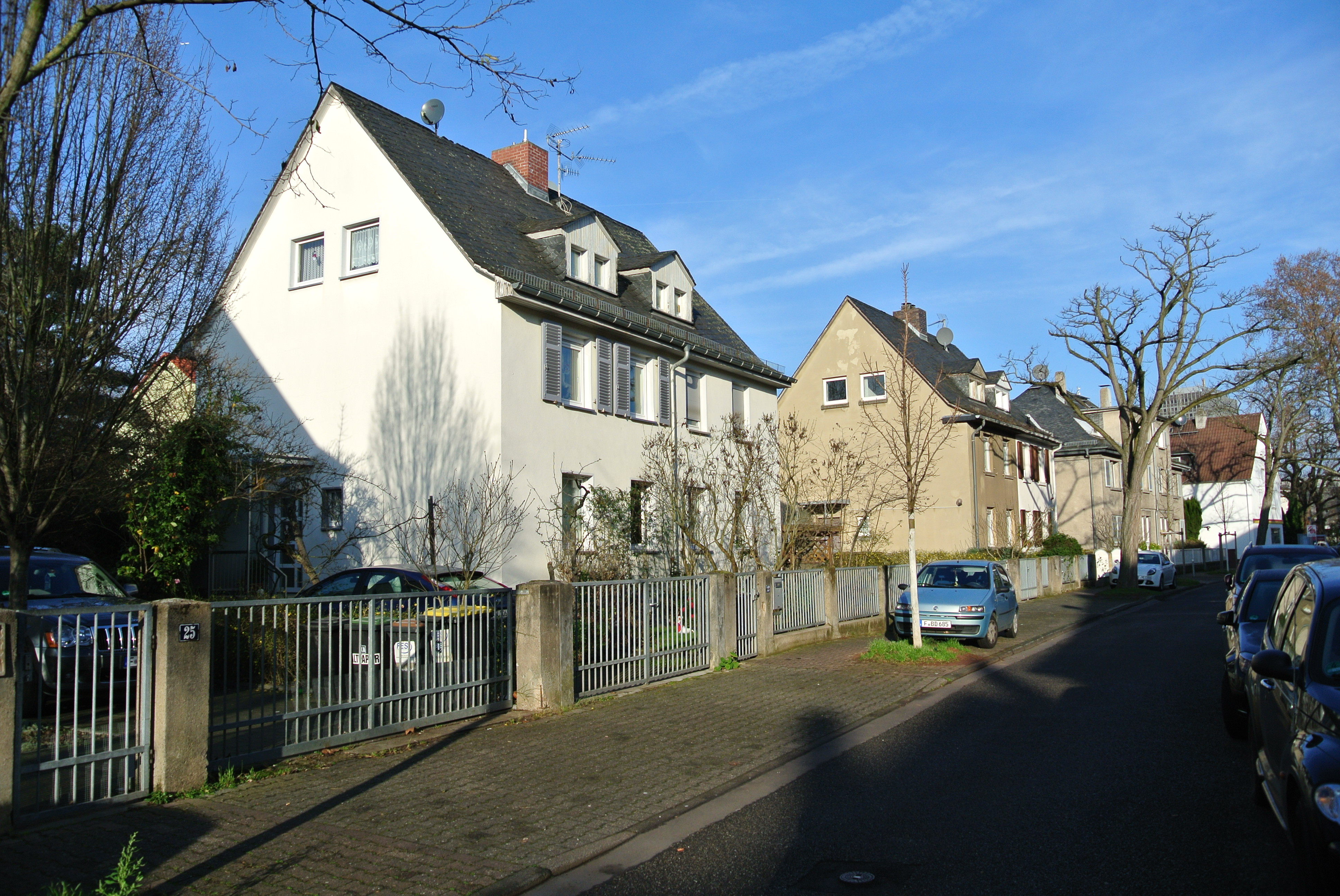 Kuhwaldsiedlung in Frankfurt-Bockenheim; 1919-1922; Heimstätte; Friedrich-Naumann-Straße, südlicher Abschnitt